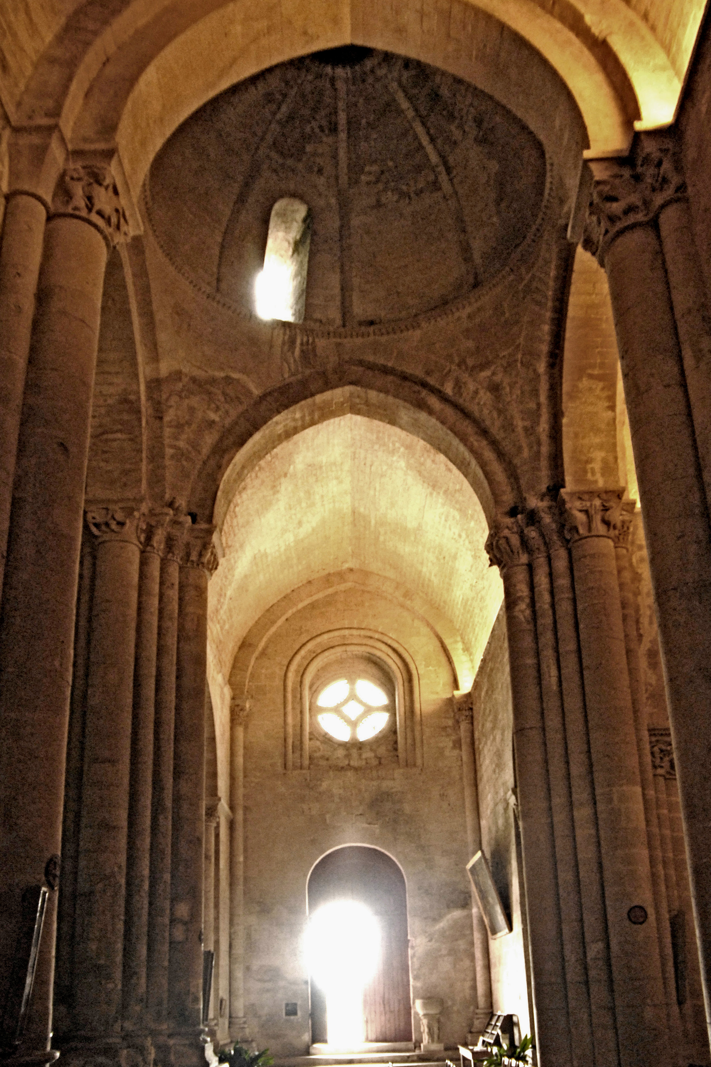 St.-Pierre Aulnay, Vierung und südl. Querhausarm